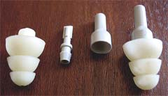 Ear plugs